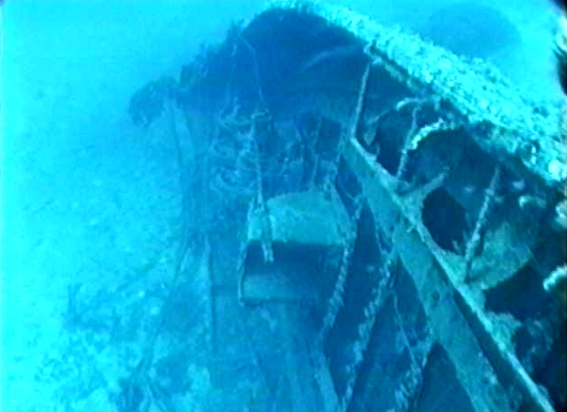 שבר ספינת המעפילים רפיח בקרבת חוף האי סיריניה